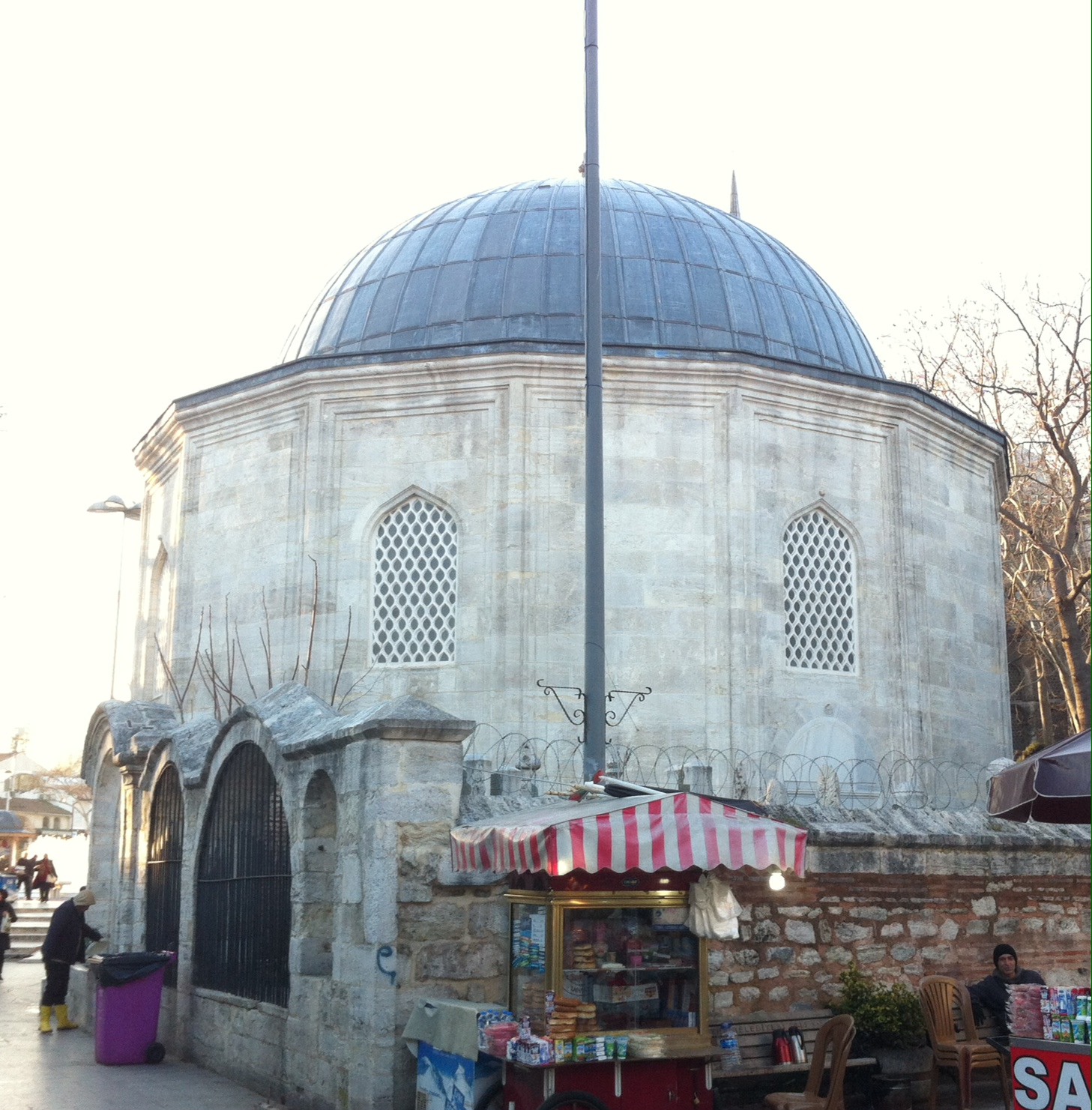 Kanijeli Siyavuş Paşa Türbesi-Eyüp